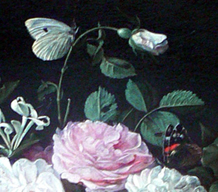 Sainte Dorothéedetail